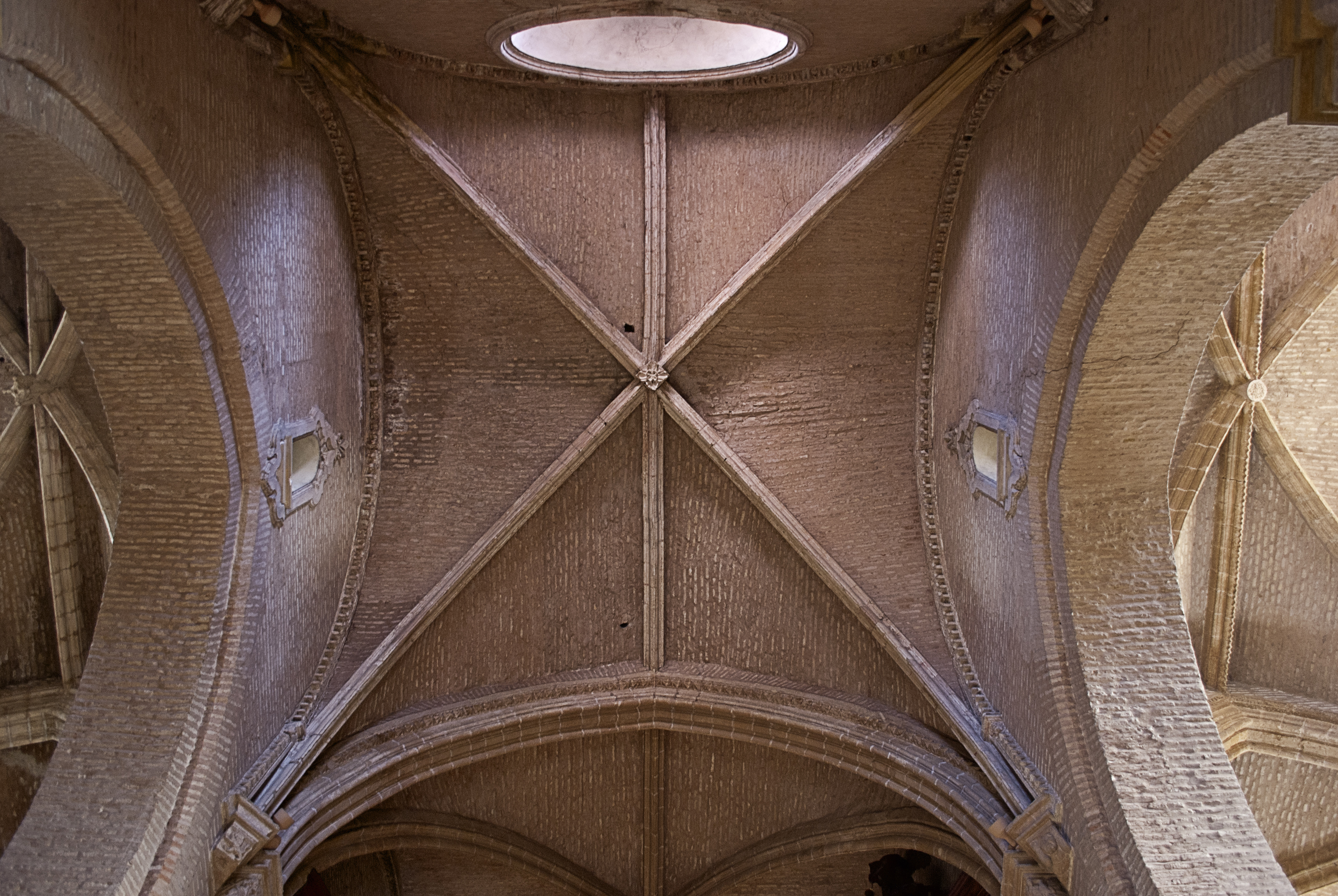 Bóveda de crucería de la iglesia de Santa Ana. (Sevilla)